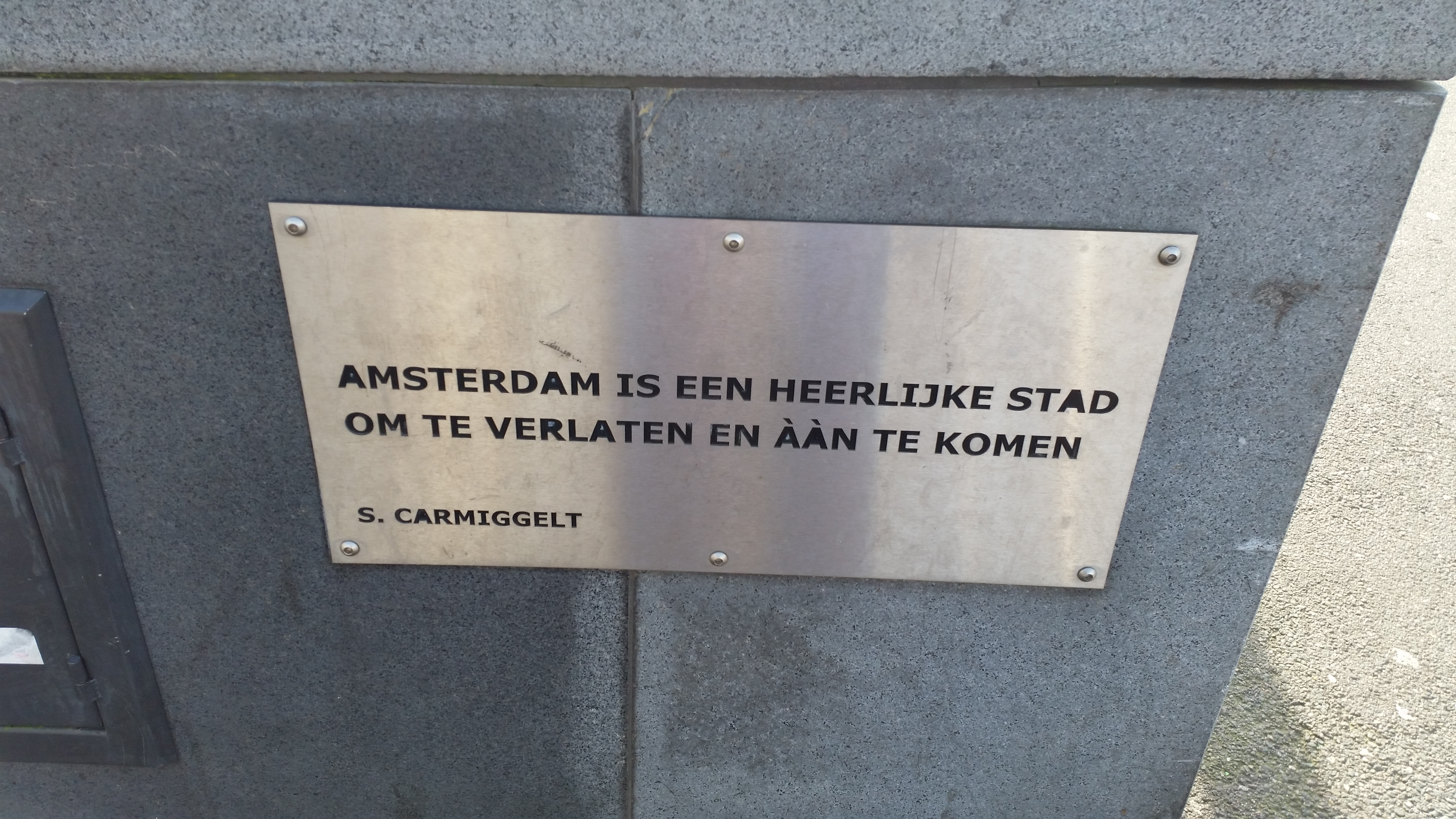 Plaquette met tekst van Simon Carmiggelt op Brug 2358, Odebrug